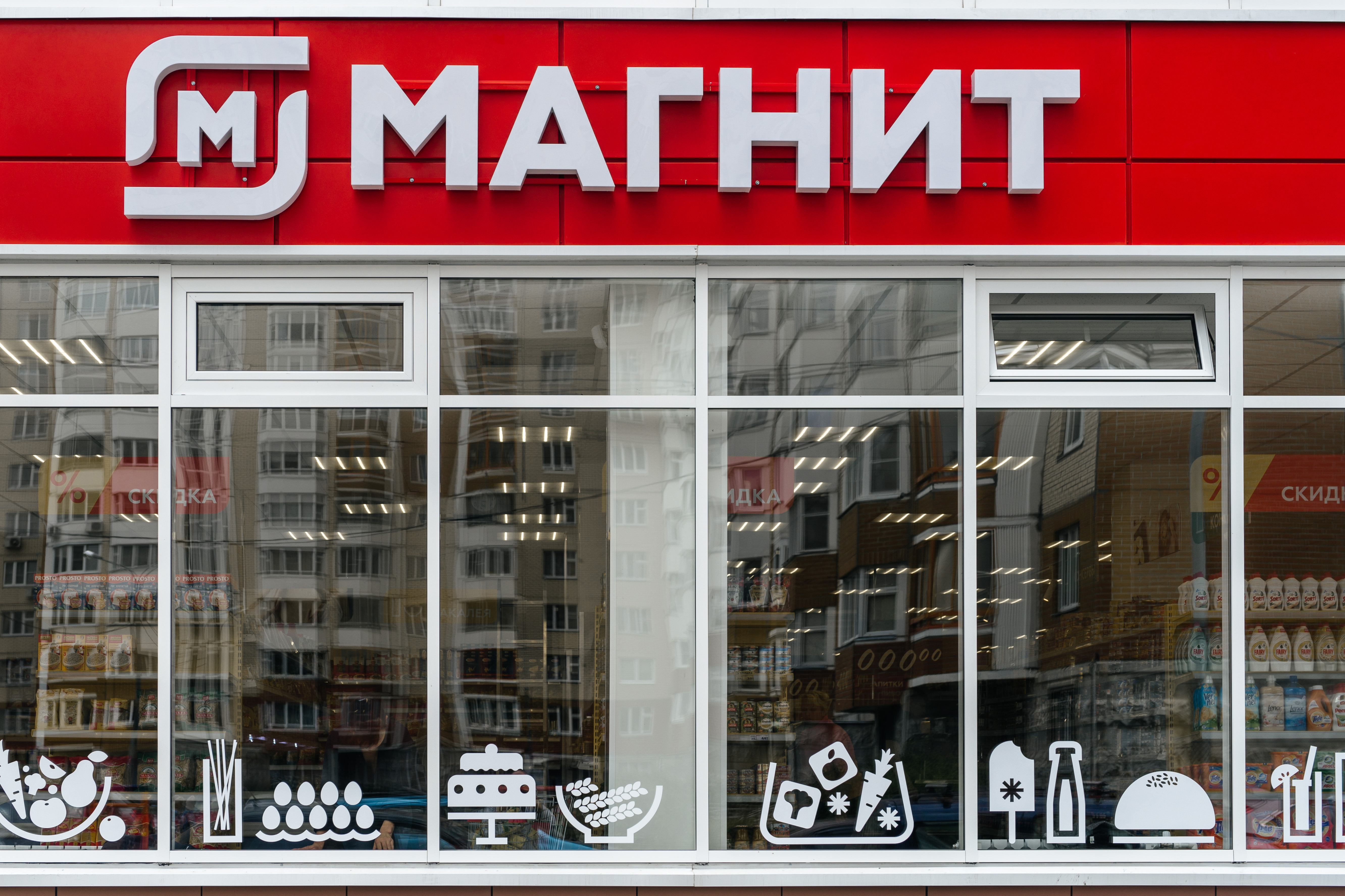 Магазин Магнит Сити на Большой Татарской улице, Москва, формата "У Дома"